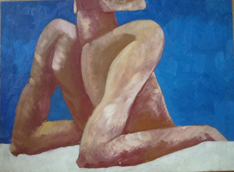 Bor István Iván: Akt. Olaj, fa, Jelezve balra fent.